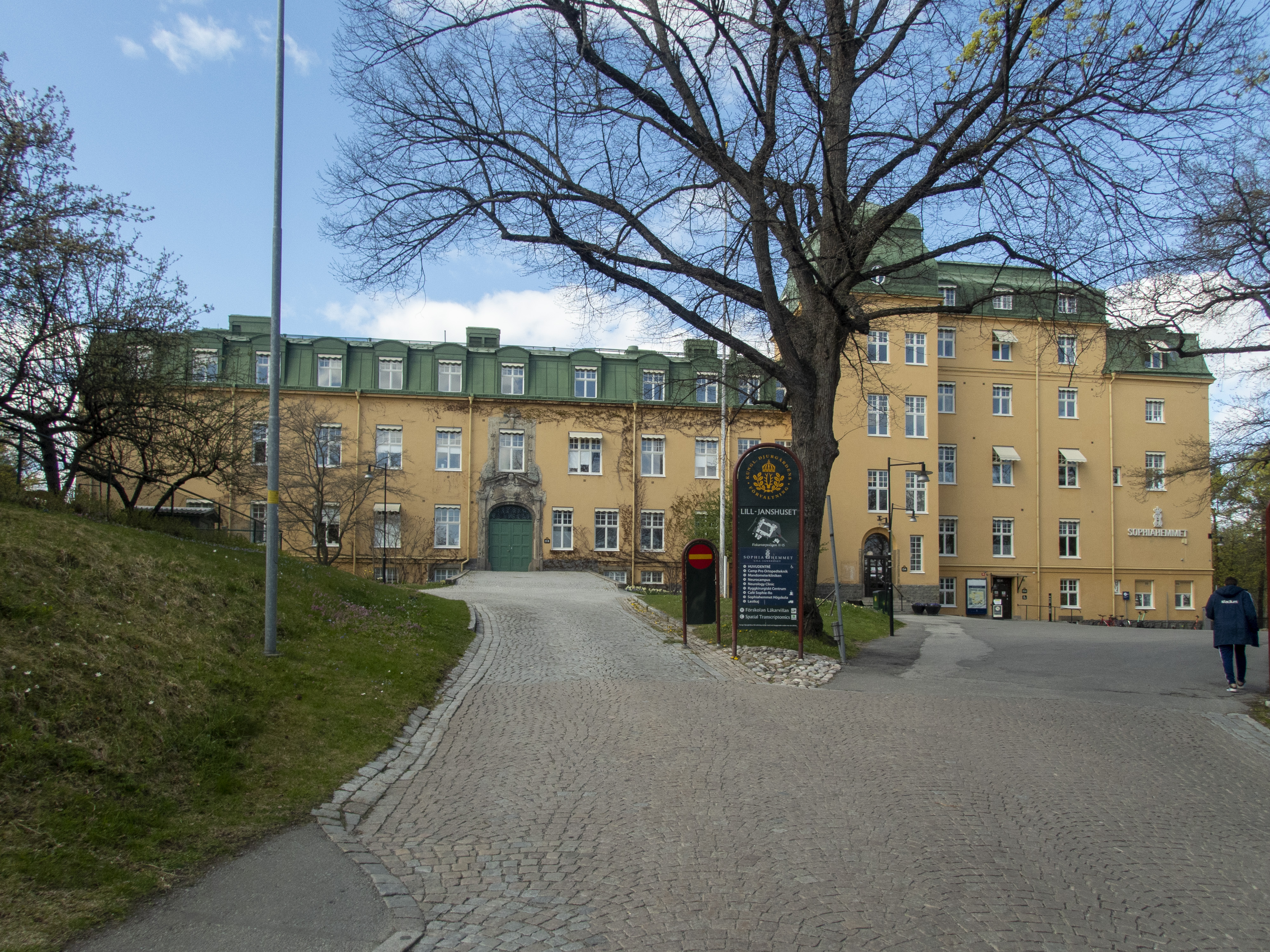 Lill-Janshuset, ursprungligen Allmänna barnbördshuset invigt 1913. arkitekt Gustaf Wickman